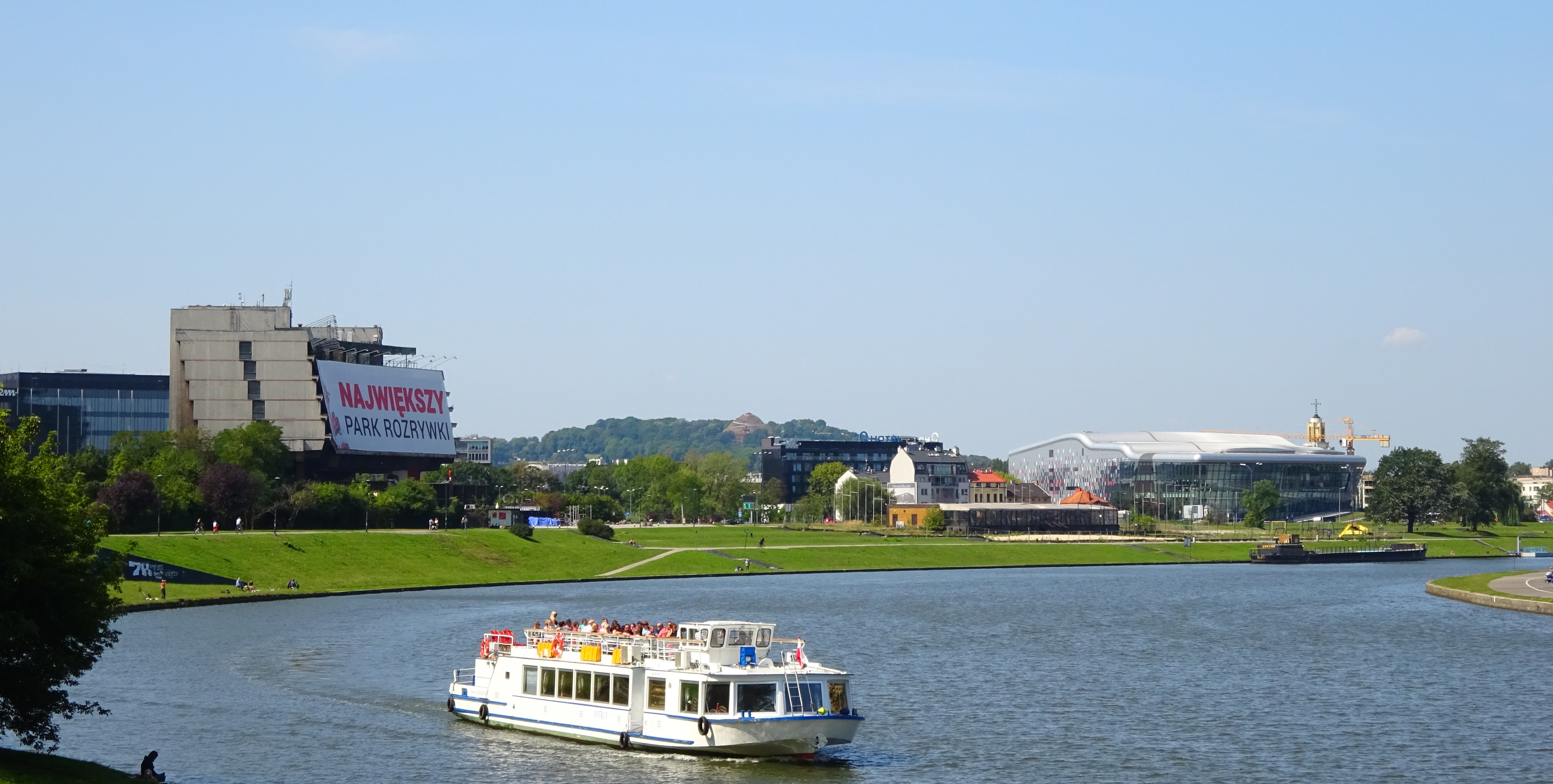 Bulwar Wołyński w Krakowie. Widok ze wschodu. Widoczne Hotel Forum, Centrum Kongresowe ICE i na dalszym planie Kopiec Kościuszki. 2017